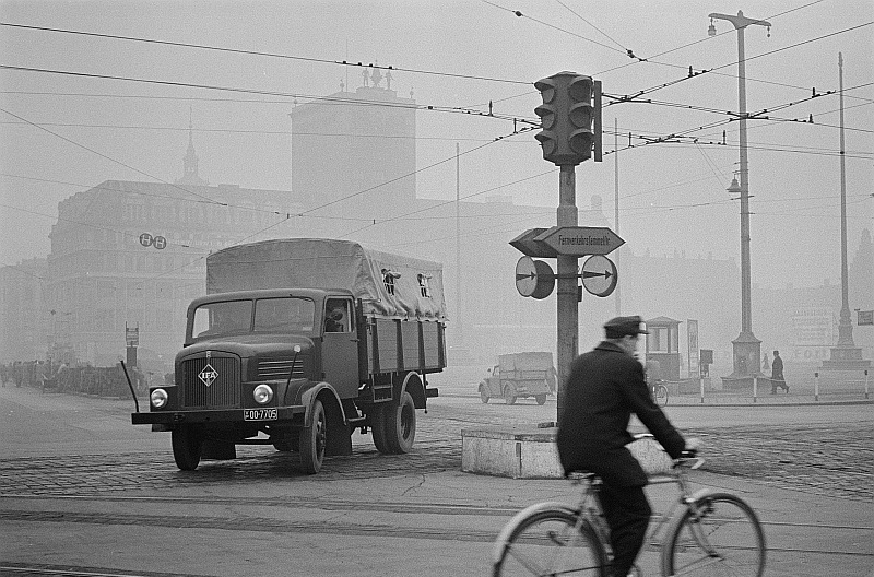 Original image description from the Deutsche Fotothek Ampelkreuzung am Karl-Marx-Platz (heute: Augustusplatz)